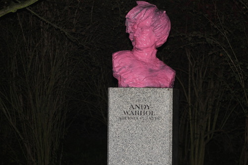 Andy Warhol